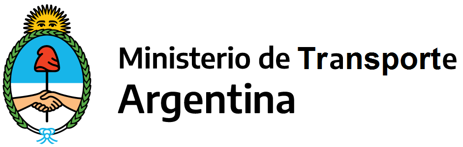 Ministerio de Transporte